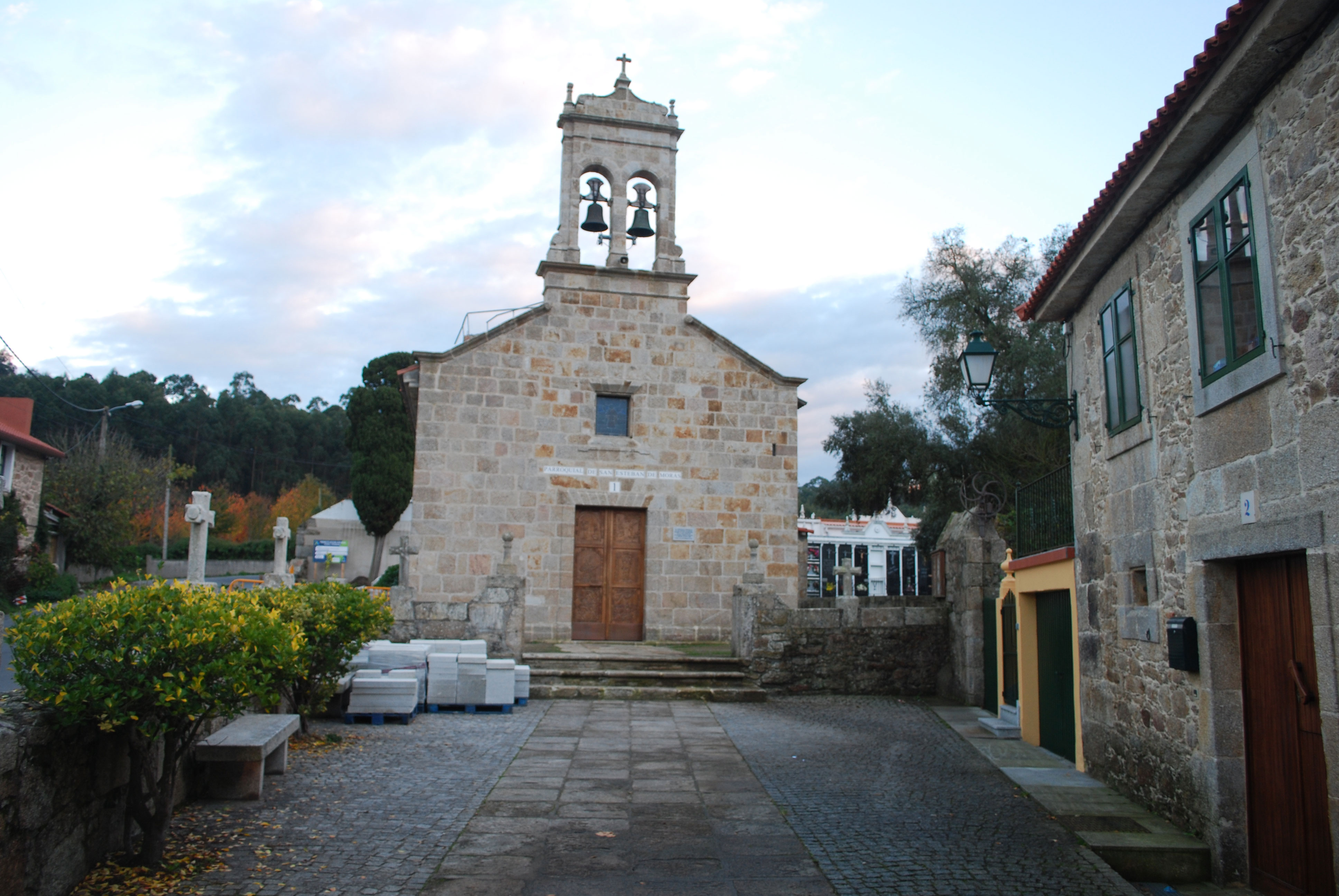 Vista da Igrexa de San Esteban de Morás (Século XII) Arteixo A Coruña Galiza Spain